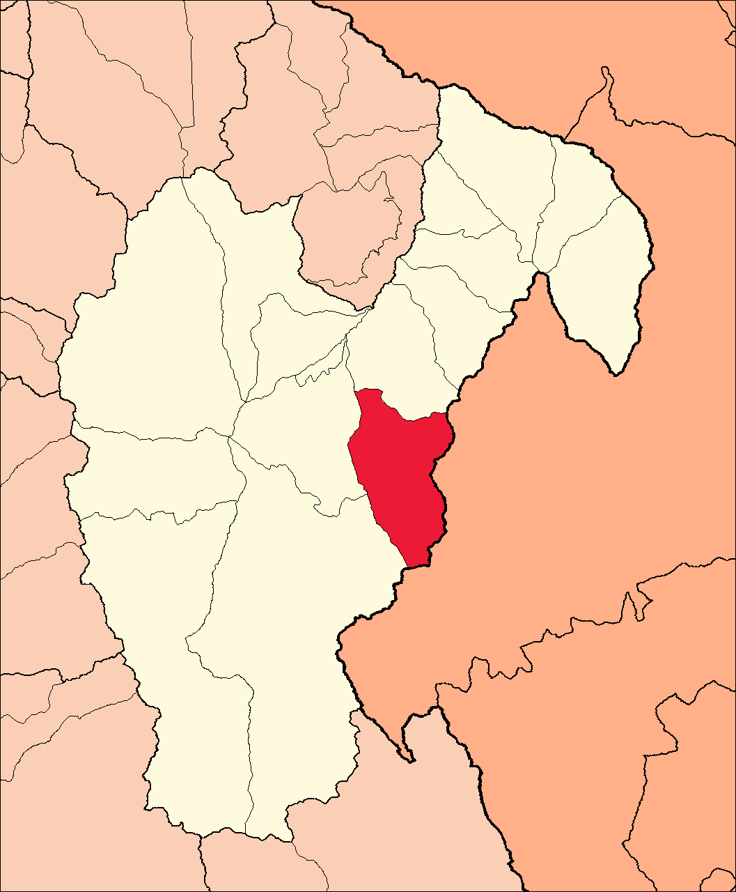 Área del distrito de San Pedro de Chaná dentro de la provincia de Huari.